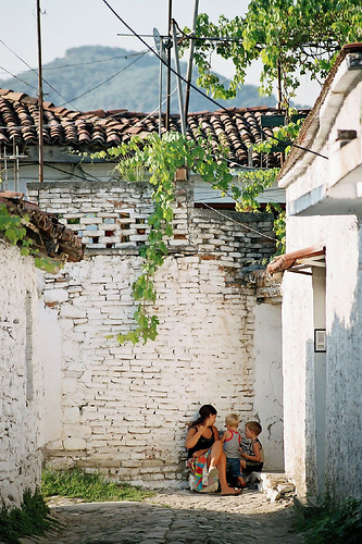 Elbasan